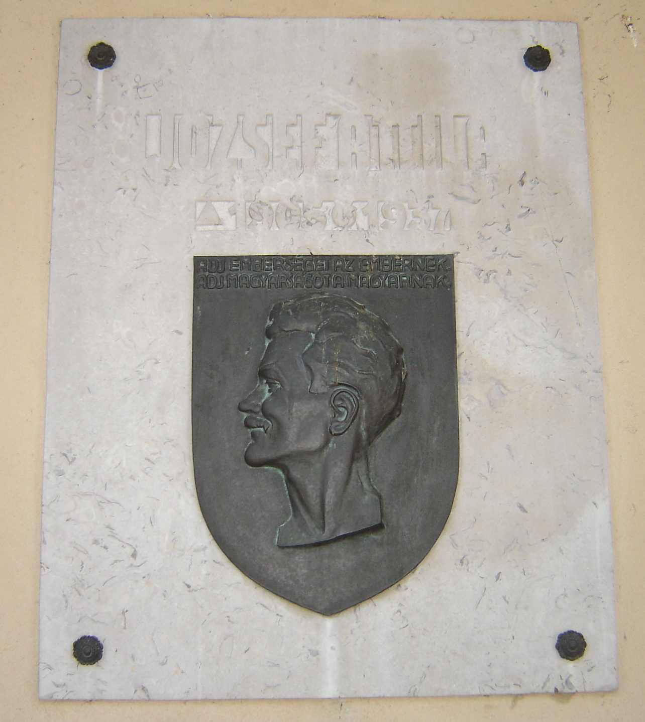 József Attila domborműve a szegedi Nemzeti Emlékcsarnokban a Dóm tér déli oldalán. A dombormű Tápai Antal alkotása